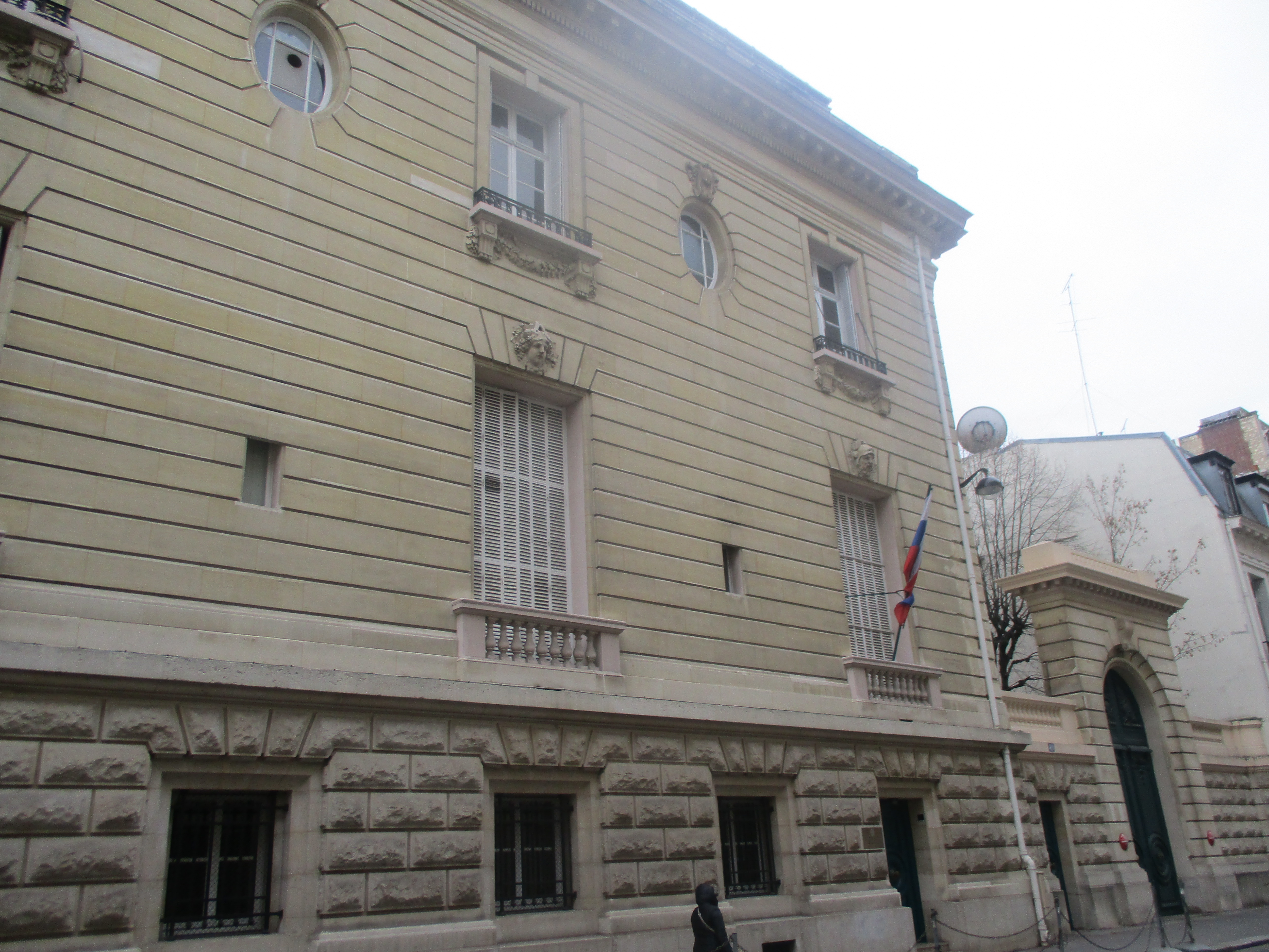 49 rue de la Faisanderie, Paris XVIe. Siège de la Délégation commerciale de la Fédération de Russie en France